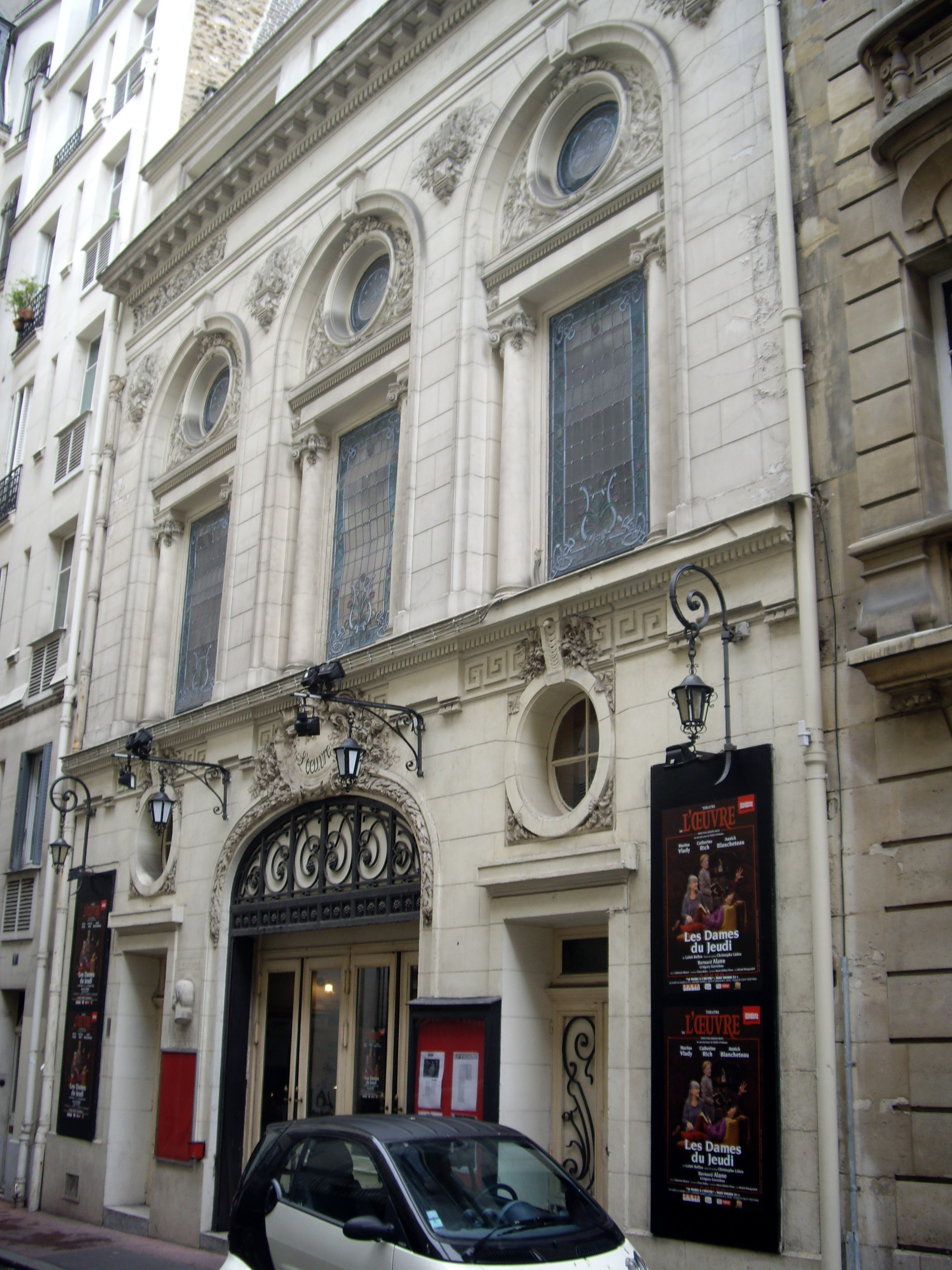 Théâtre de l'Œuvre, 3 cité Monthiers, Paris 9e.